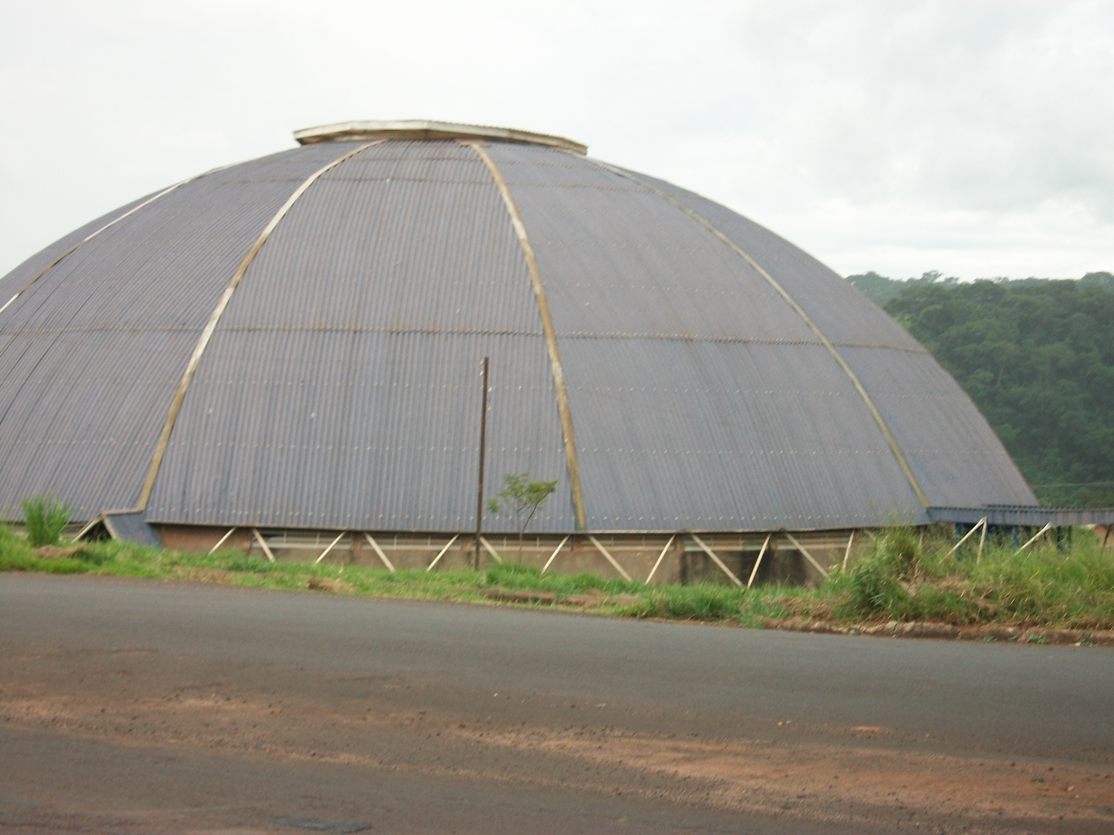 Ginásio de Esportes Amadeu G., na Praça brasil, em São Simão - SP, fevereiro de 2010.